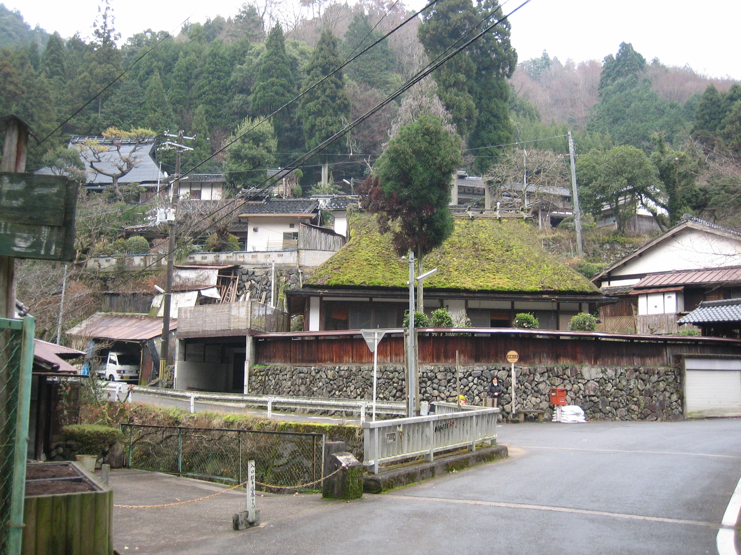 雲ケ畑出合橋を京都市北区雲ケ畑中津川町から撮影